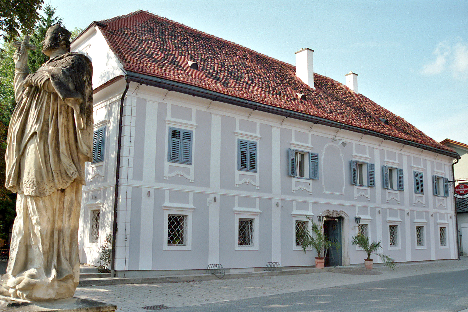 Gasthaus in Sankt Veit am Vogau, Steiermark.